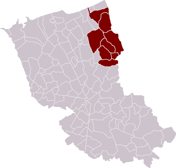 Locatie Kanton Hondschote in het arrondissement Duinkerke, Frankrijk - zelfgemaakt Location Canton of Hondschoote in the Dunkirk district, France - self made Localisation Canton d'Hondschoote dans l'arrondissement de Dunkerque, France - fait moi-même